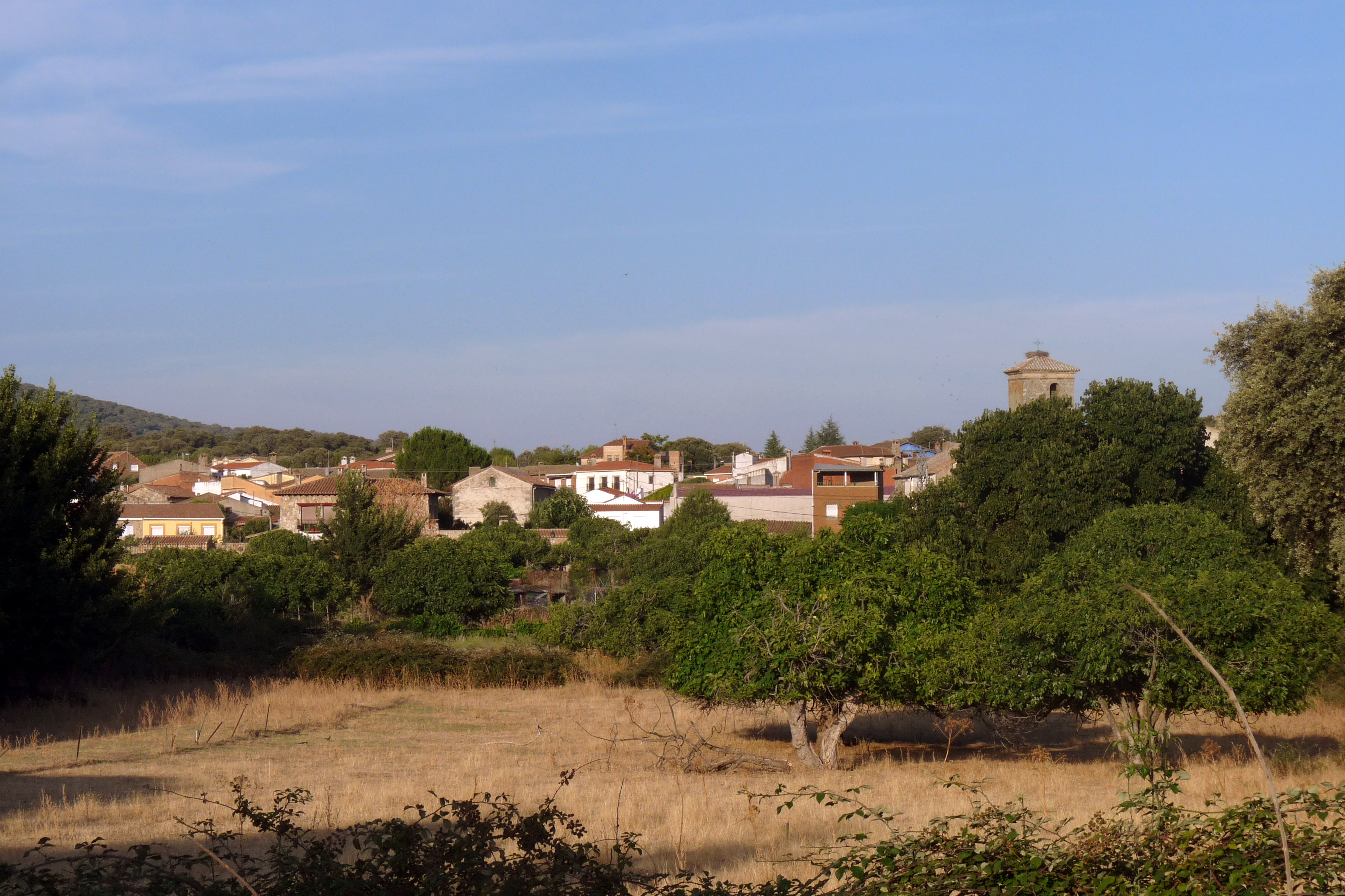 Vista de Marrupe desde el oeste.